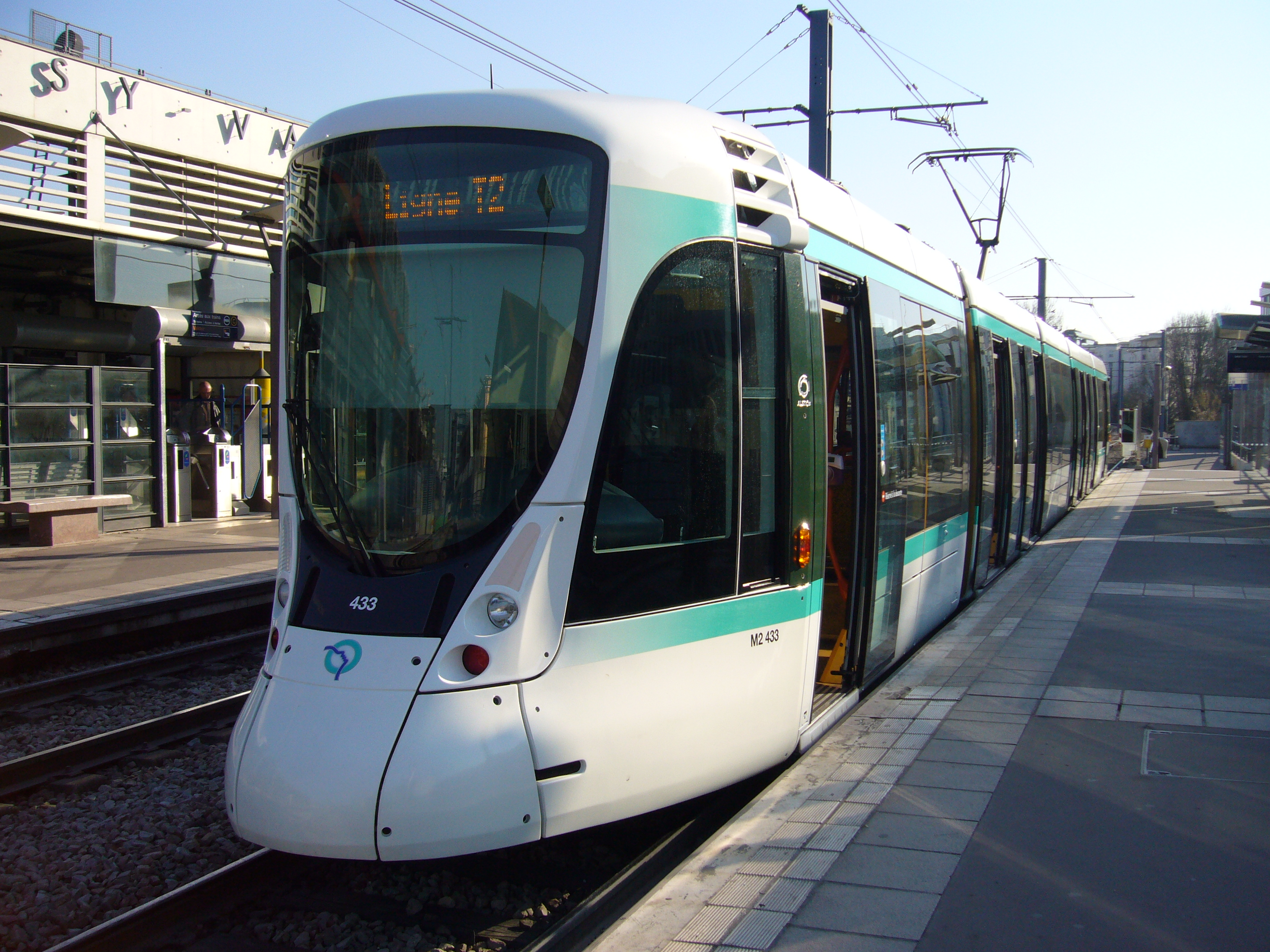 Un Citadis 302 à la station Issy Val de Seine sur la ligne 2 du tramway d'Île de France.